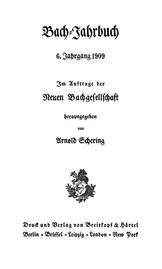 Titelseite der Zeitschrift / Title page of the periodical